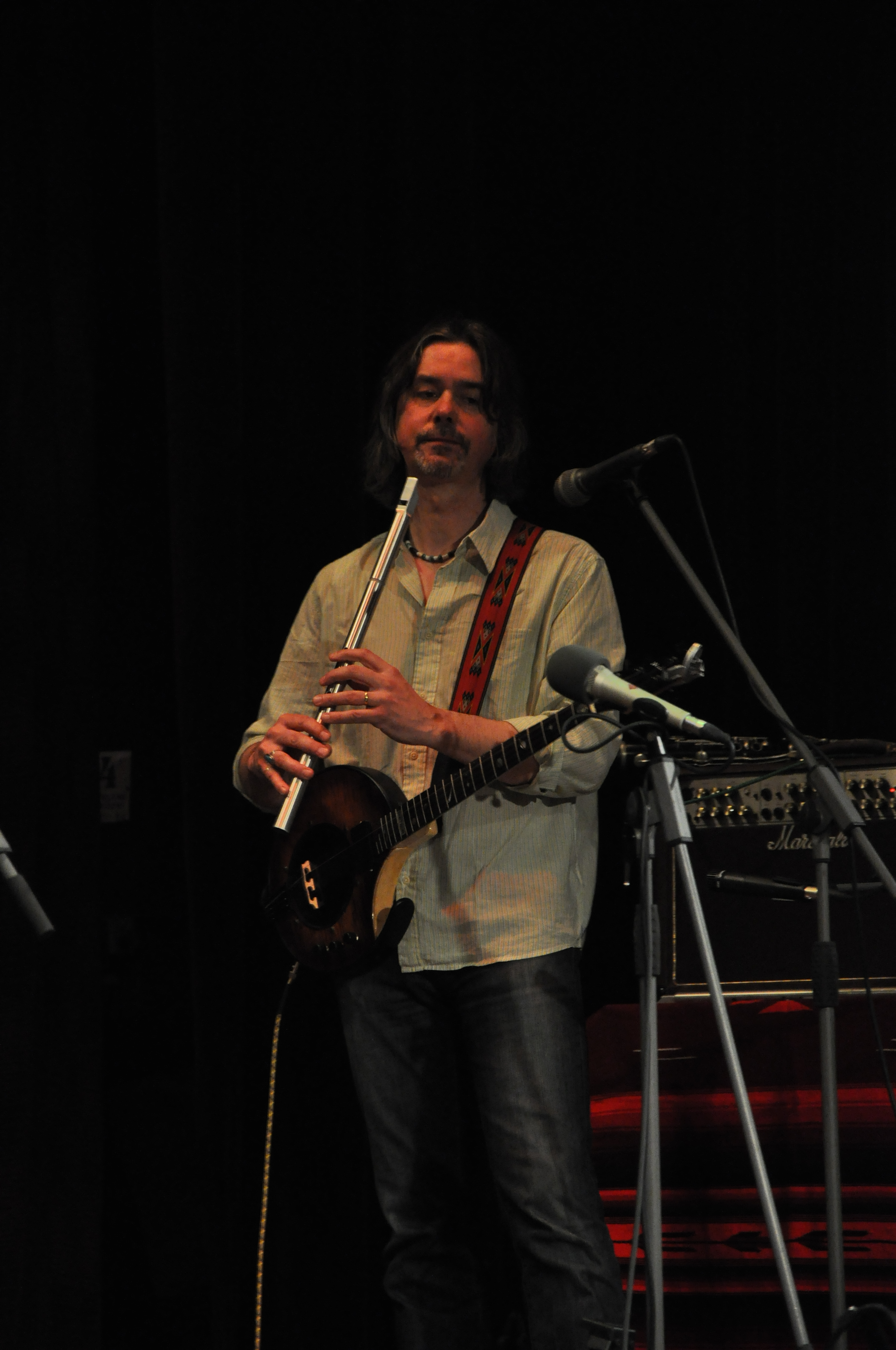 Luboš Malina na dvojkoncertě skupin Garcia a Druhá tráva v Hradci Králové